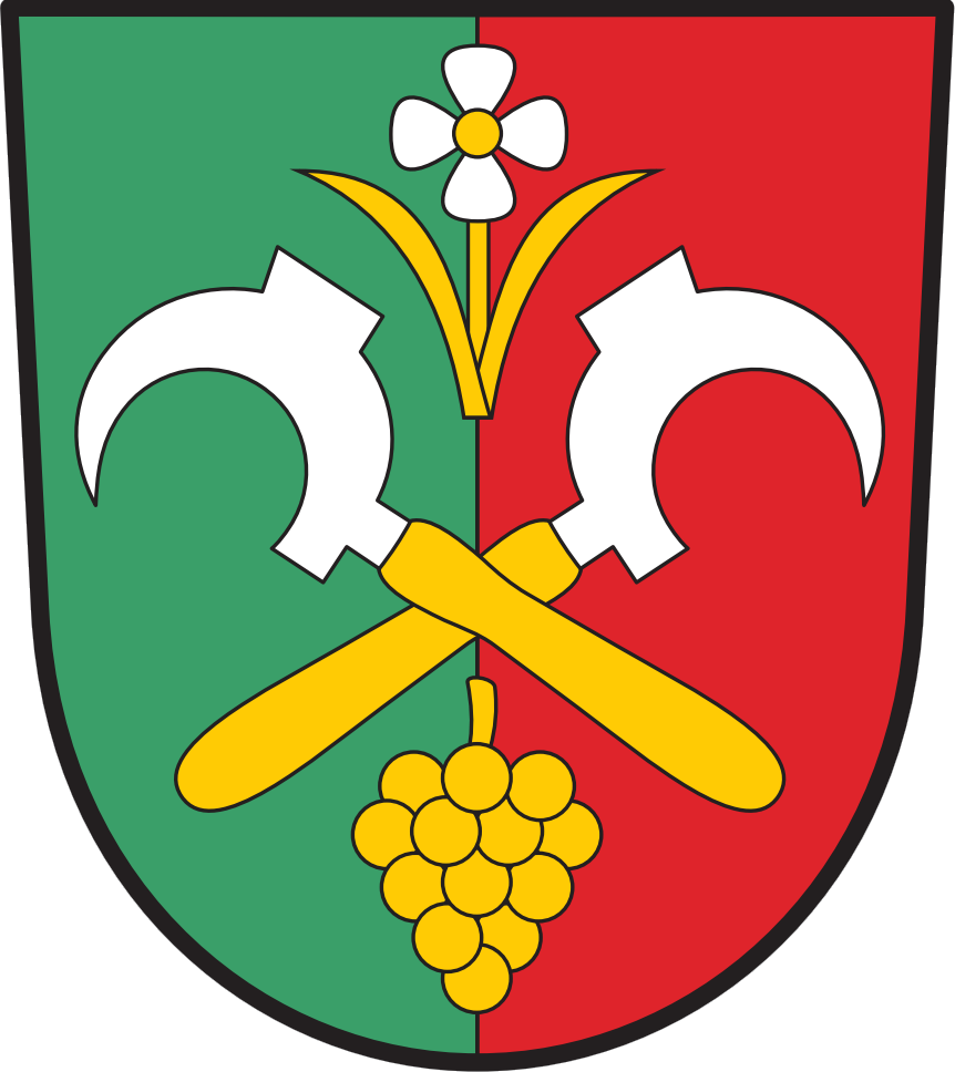 Znak obce Moravské Bránice